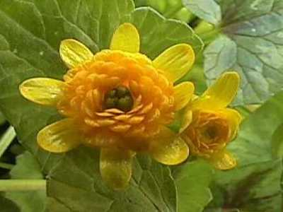 Ranunculus ficaria 'Collarette'